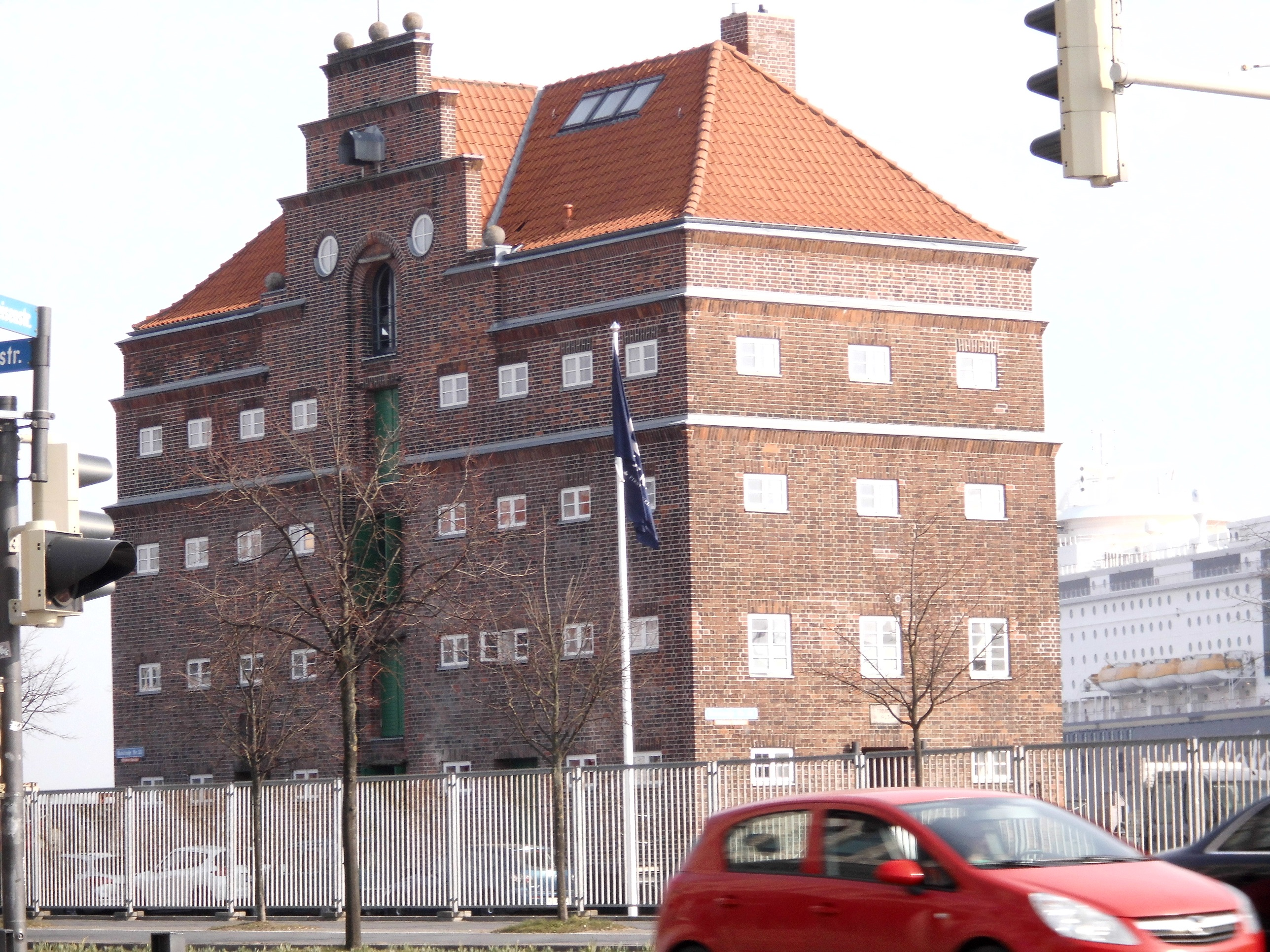 Historischer Eckmannspeicher in der Kaistraße im Kieler Stadtteil Vorstadt.